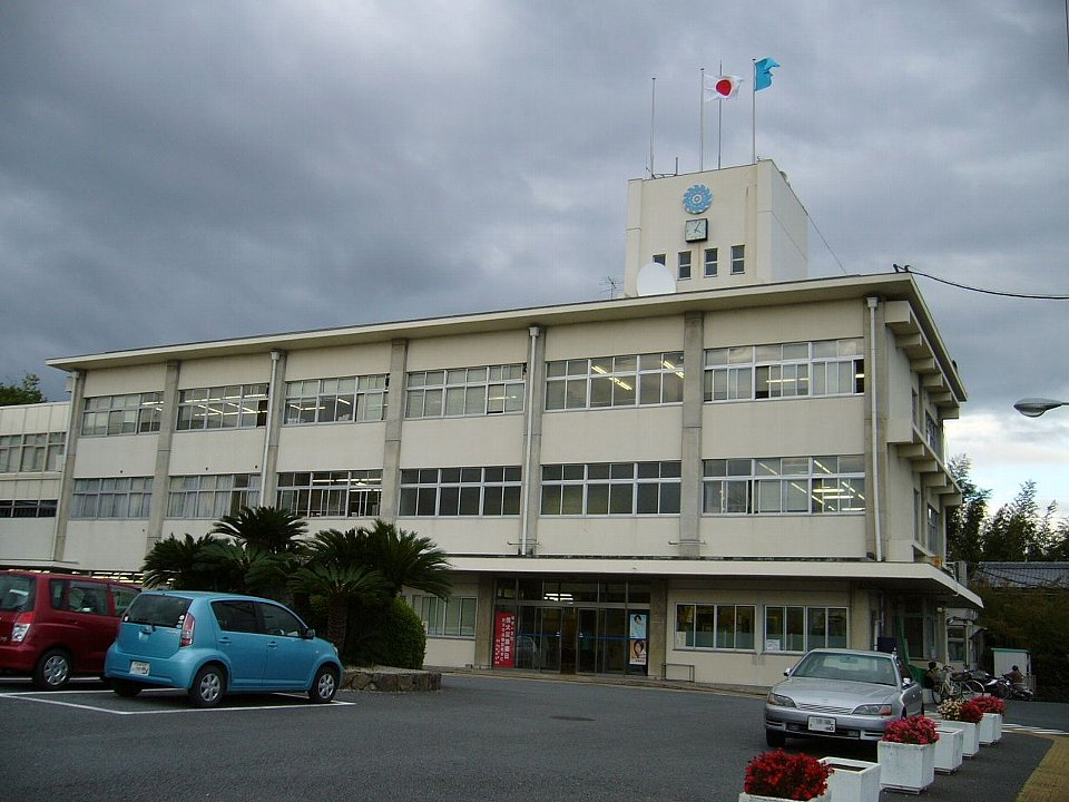 Muko City Hall in Kyoto-fu, Japan